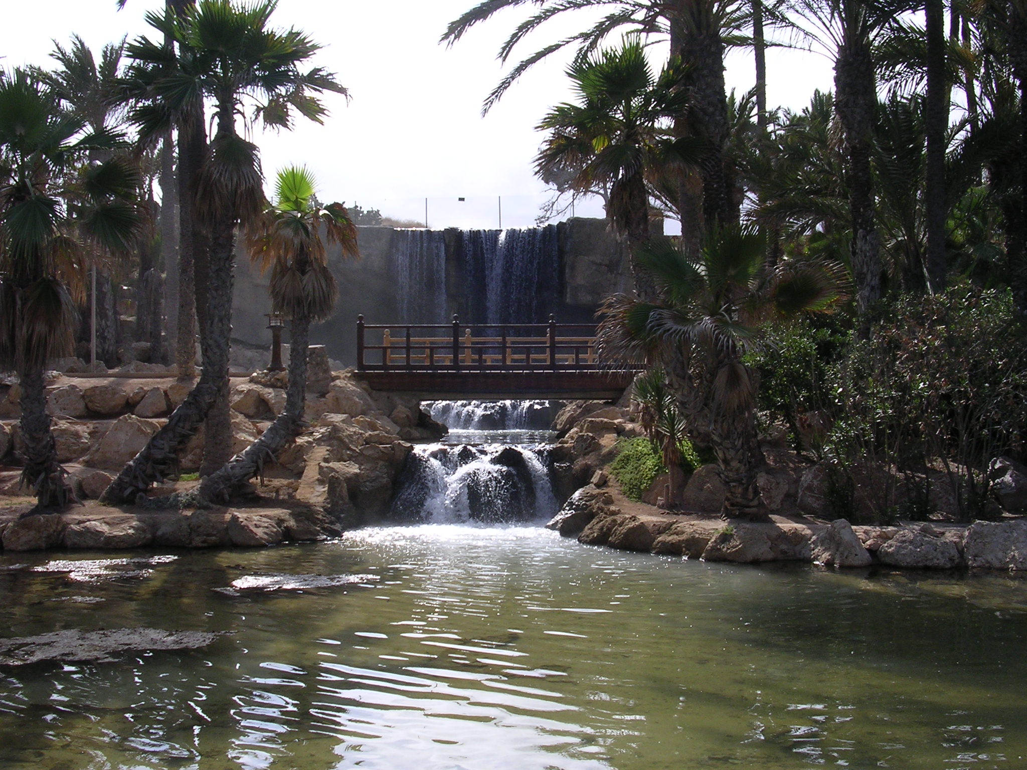 Parque El Palmeral.